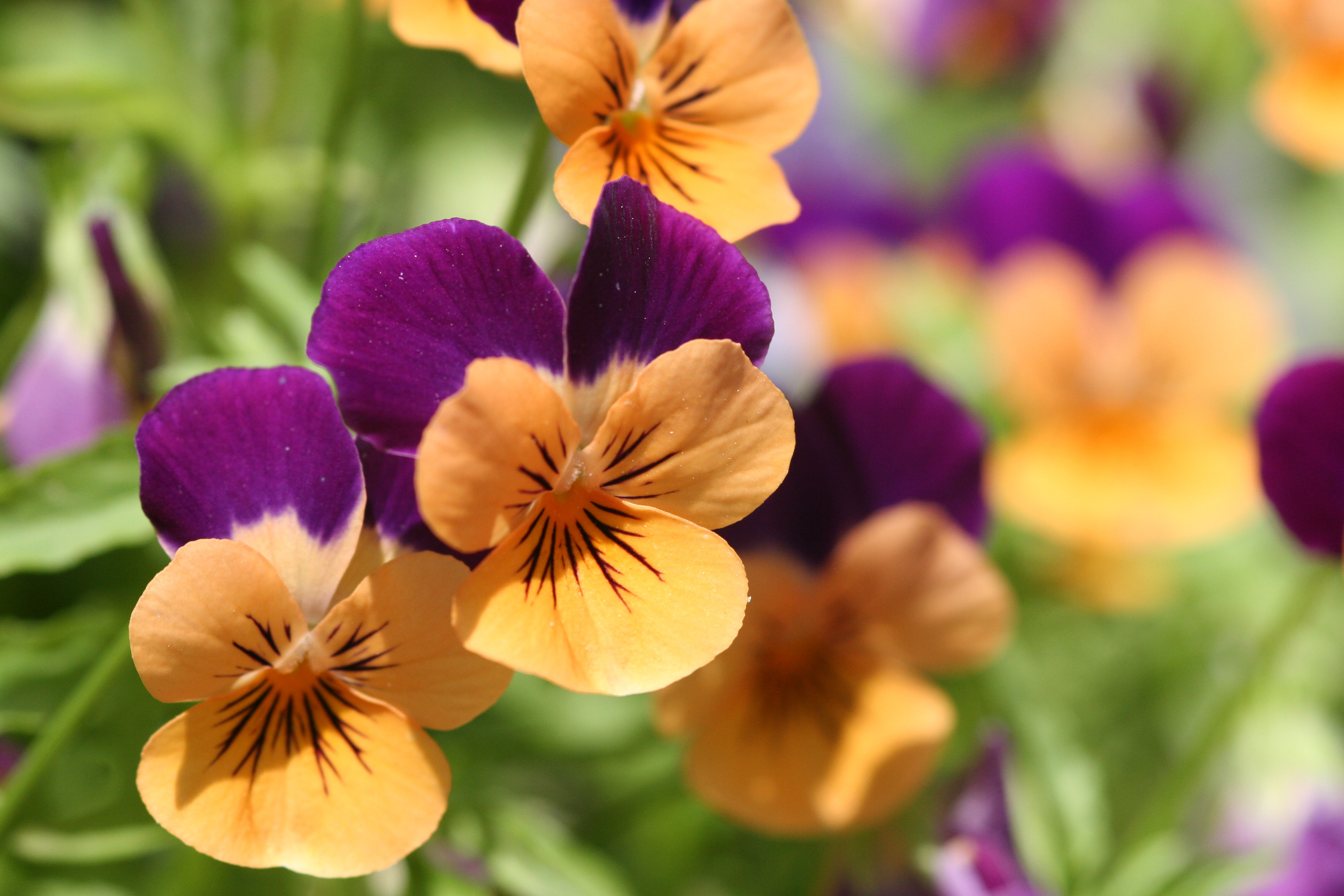 Orange and violet pansies